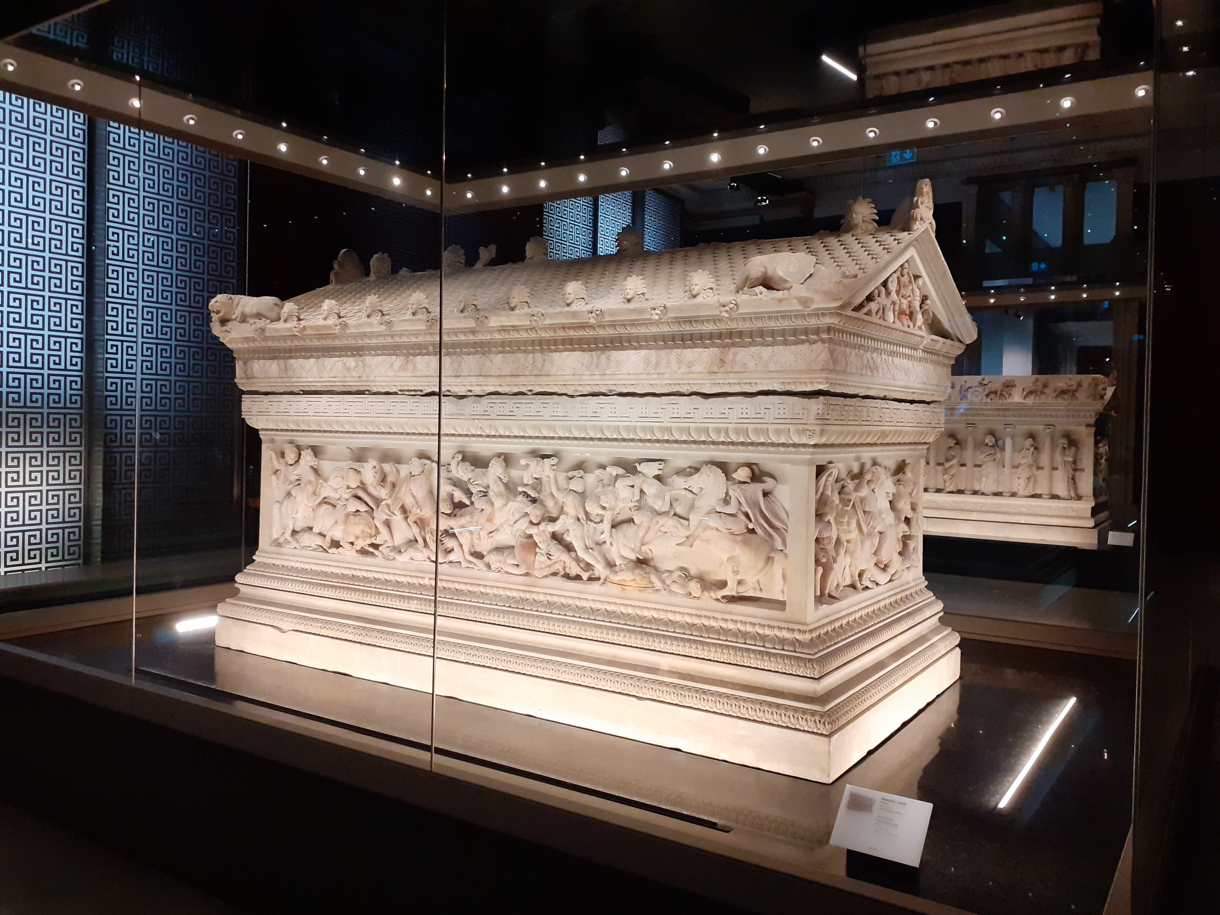 İstanbul Arkeoloji Müzesi restoresi sonrasında İskender lahdi, Ocak 2020.